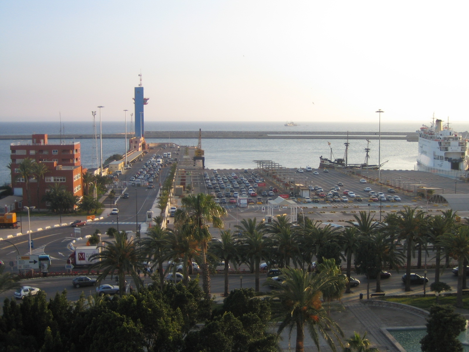 Puerto de Almería (España).